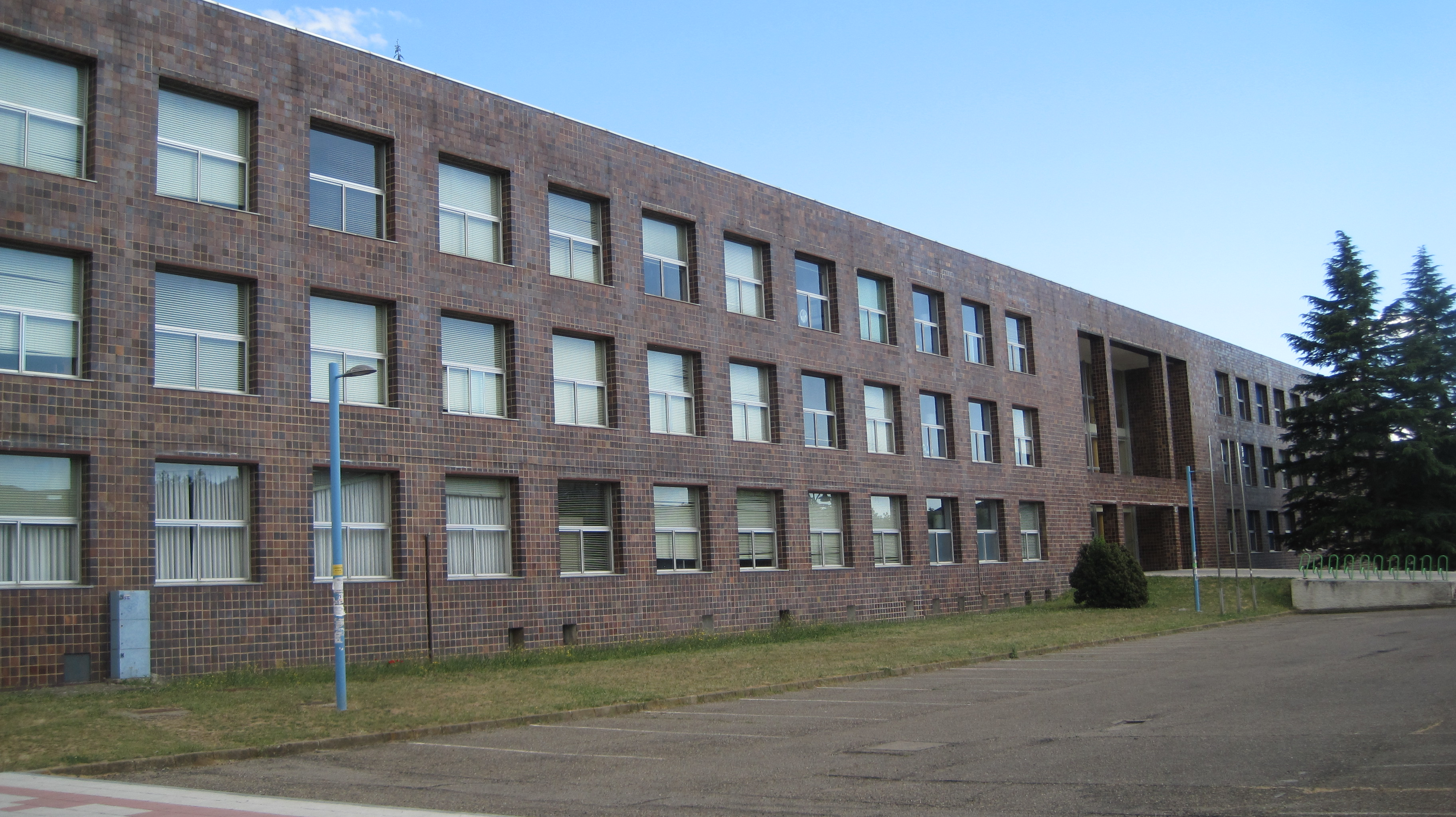 Facultad de Filosofía y Letras. Universidad de León (España).